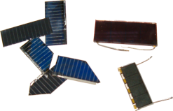 Řezy solárního panelu.